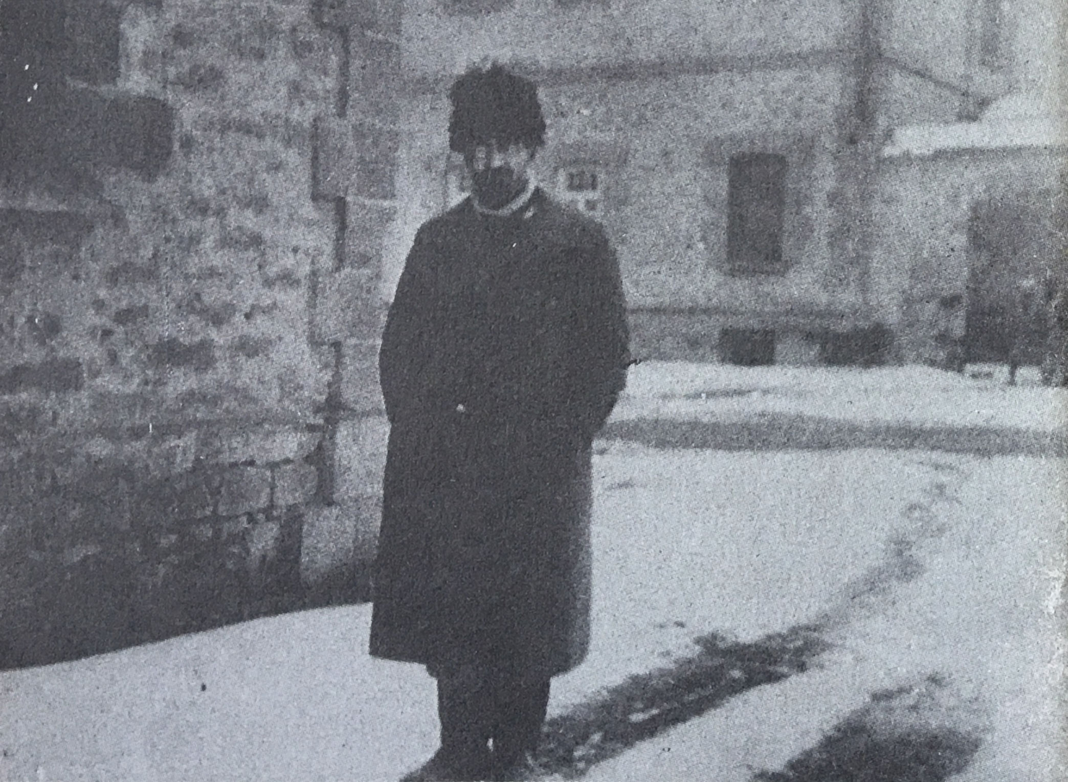 Հայ հասարակական-քաղաքական գործիչ, Հայաստանի Հանրապետության արդարադատության նախարար (1920) Ռուբեն Դարբինյանը Երևանի բանտում, 1921 թվականի հունվար